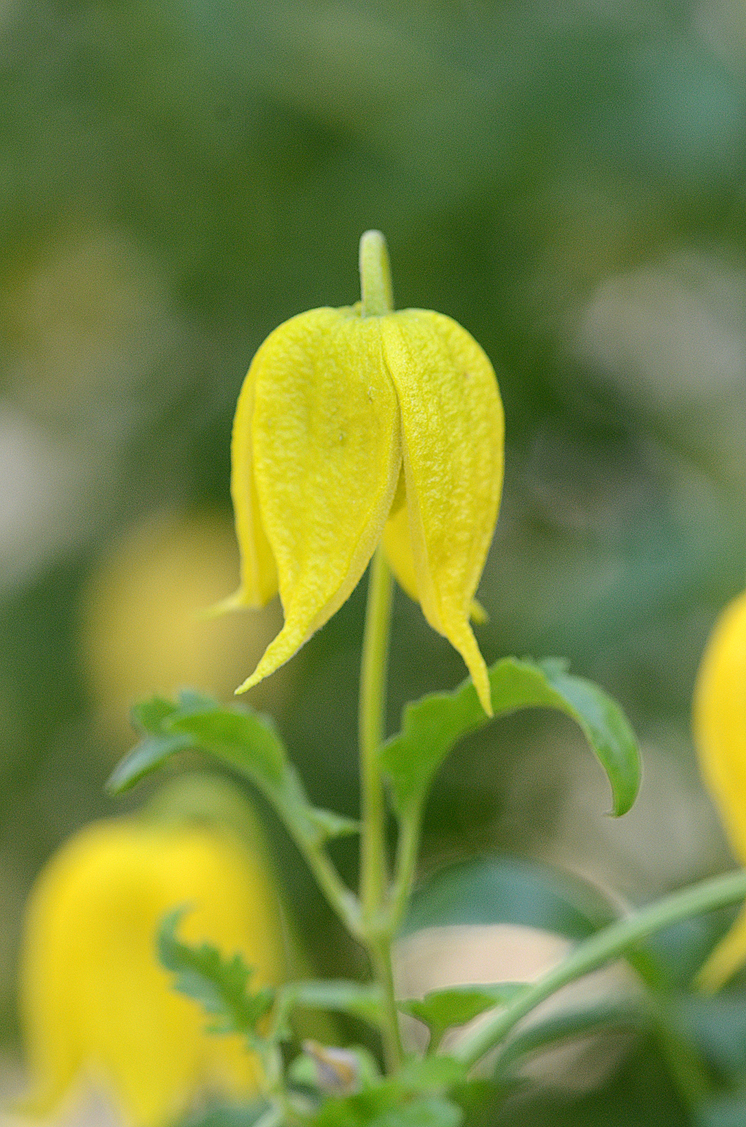 Clematis tangutica; Mongolei, China